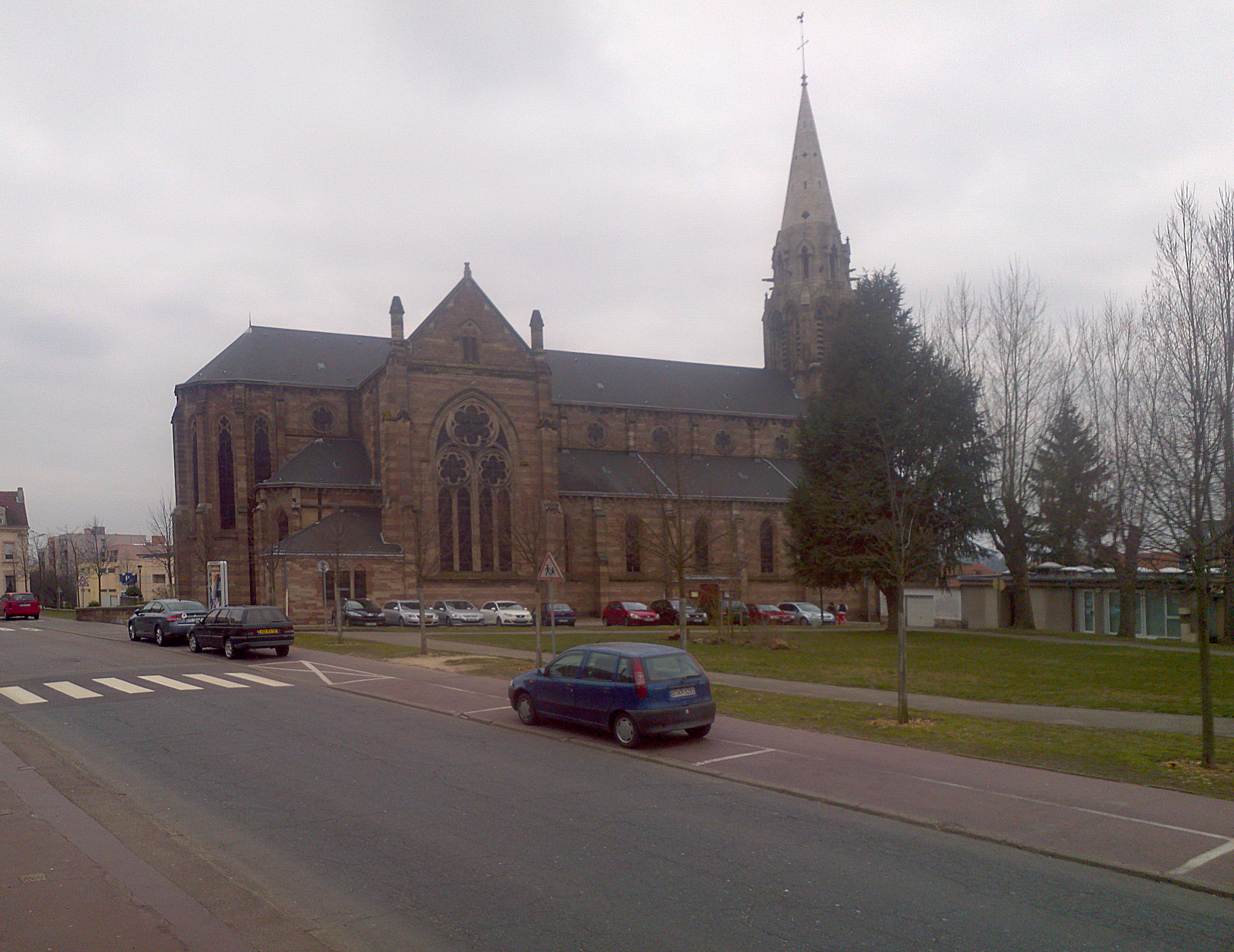 Kirche Saint Rémi Forbach